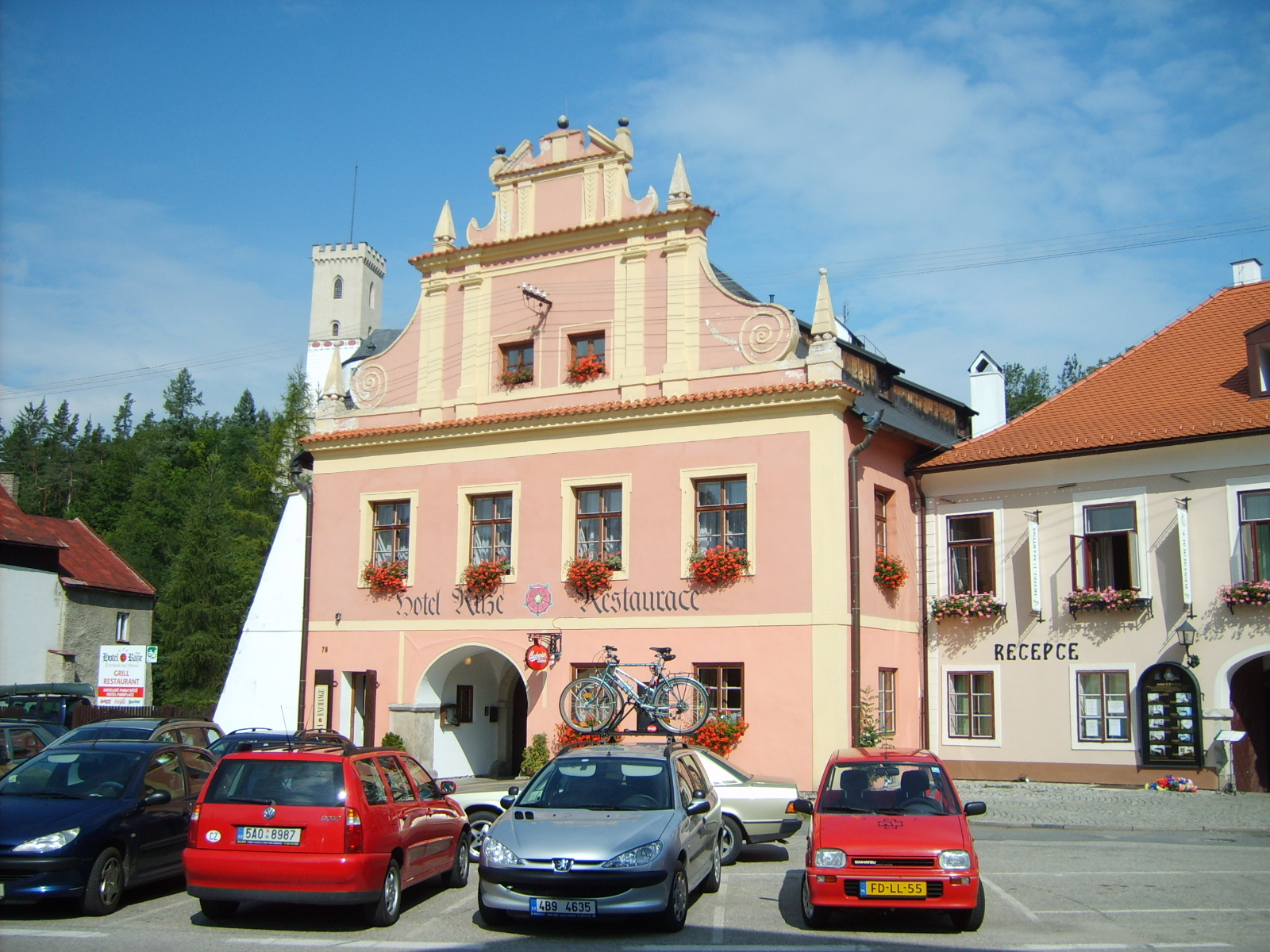 Hotel Růže, Rožmberk nad Vltavou čp. 78